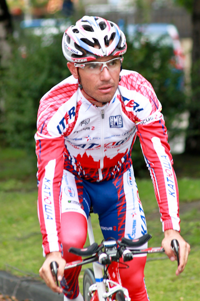 Prologue du Critérium du Dauphiné 2011, Saint Jean de Maurienne